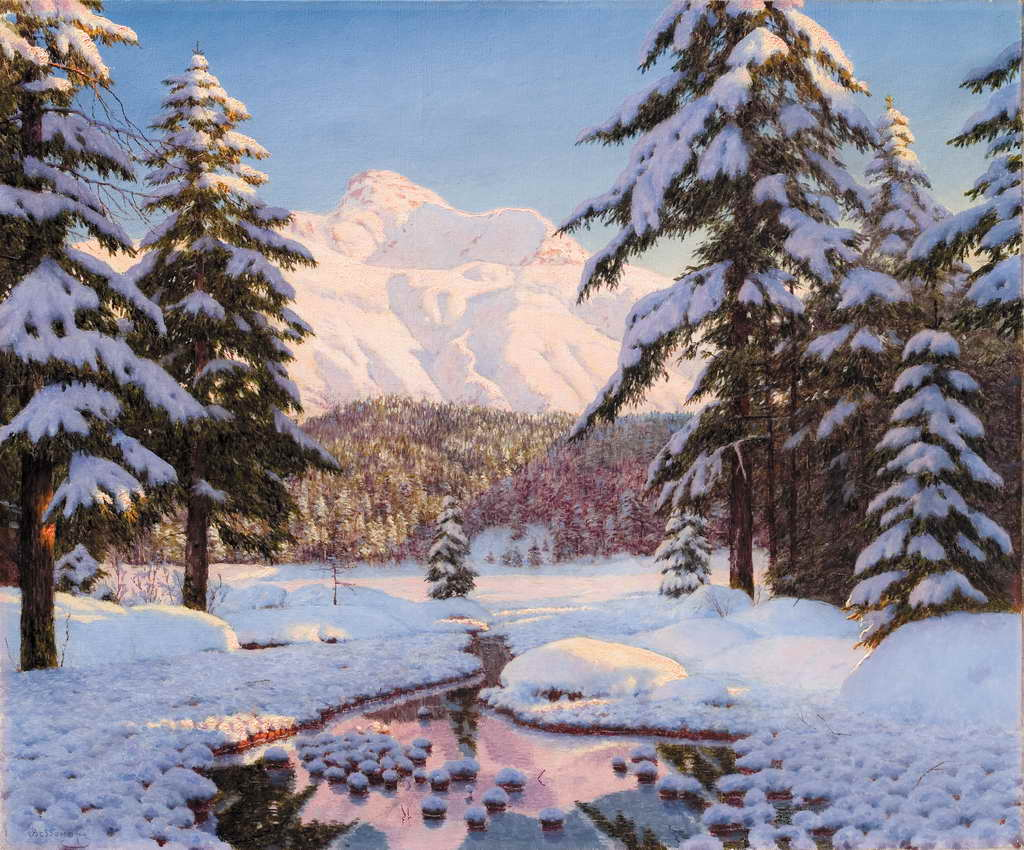 Бессонов Борис Васильевич (1862 – 1934). «Снежная зима в горах», 1920-е гг.